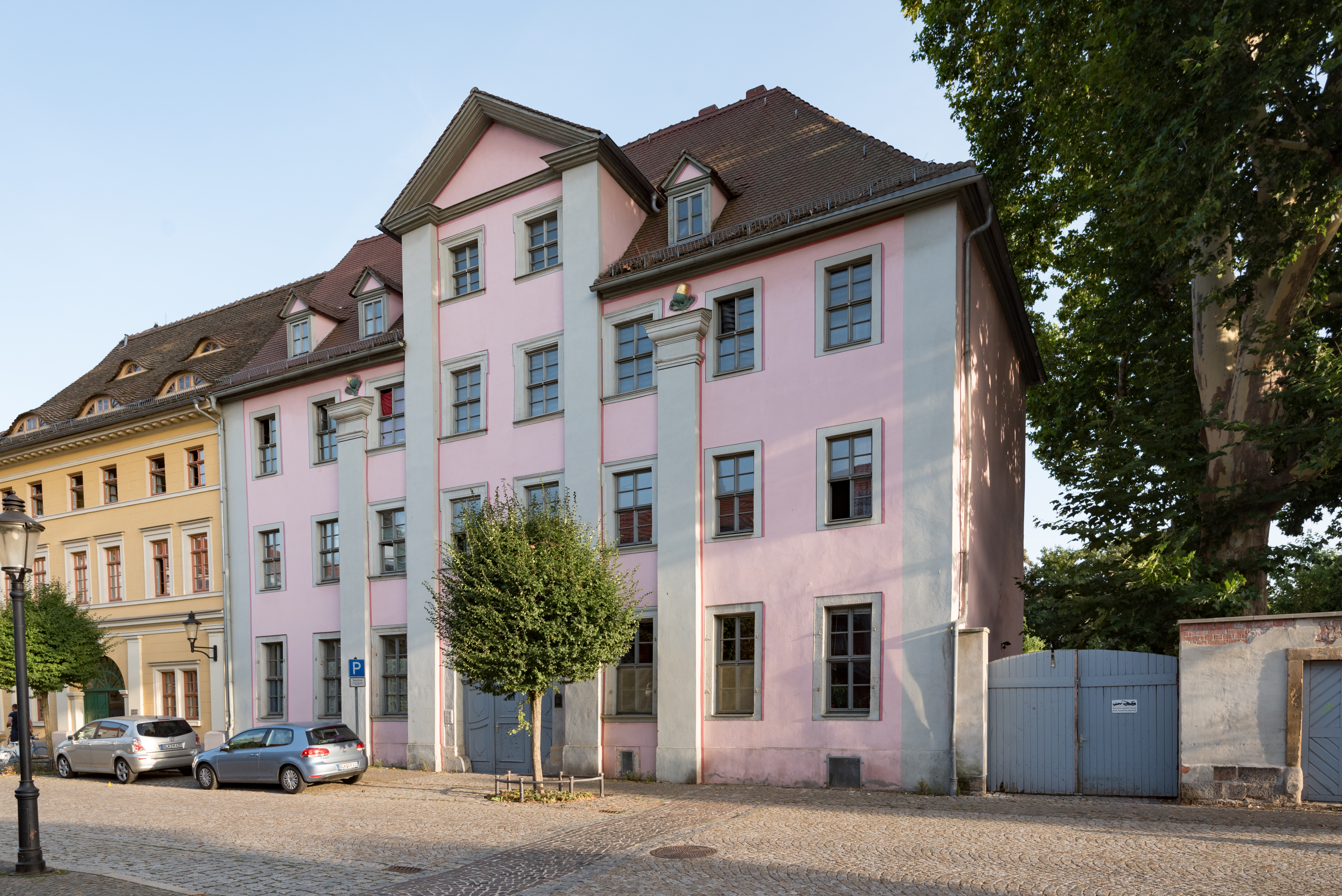 Naumburg (Saale), Neustraße 45, 46